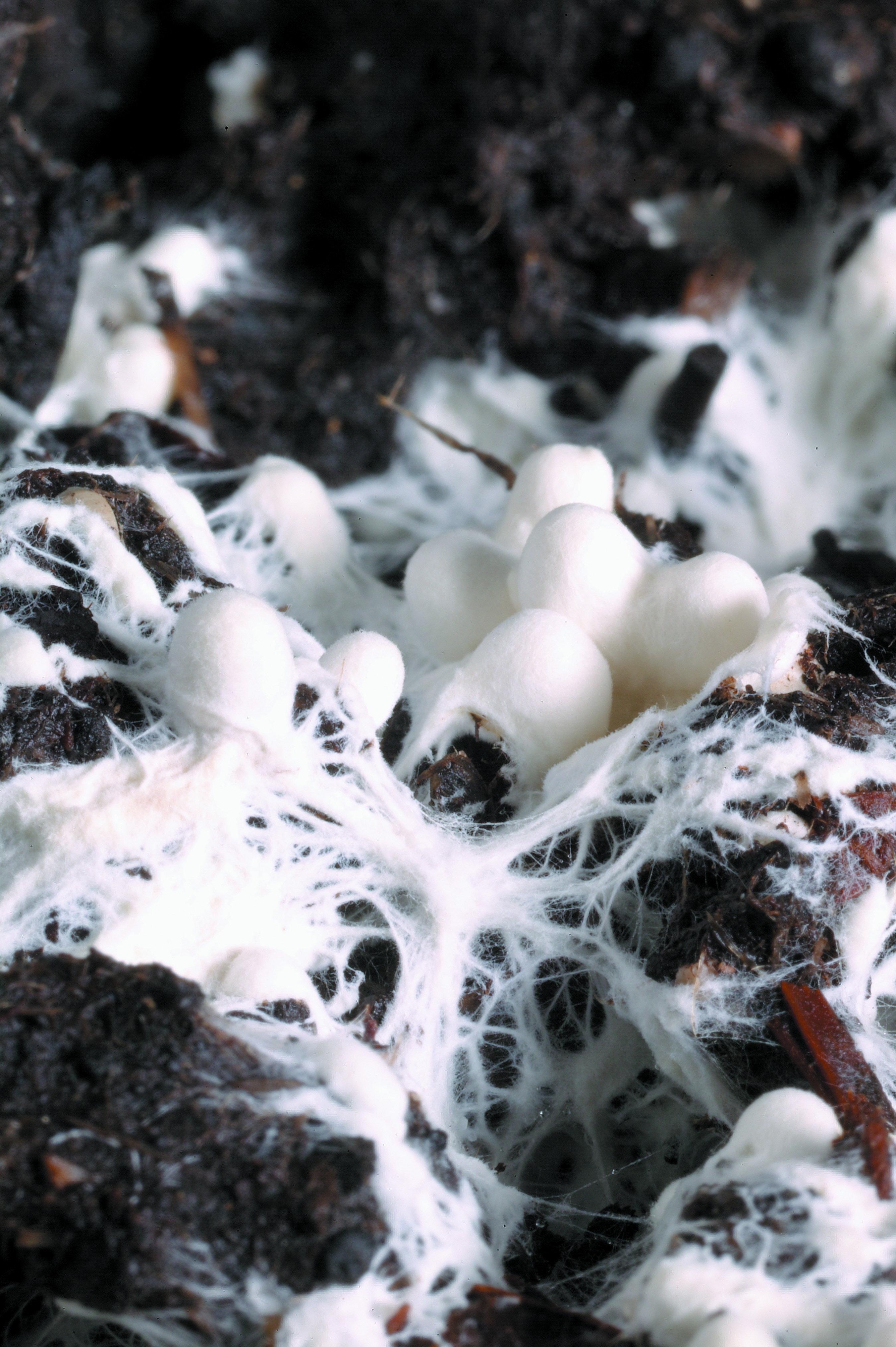 Micelio y carpóforos de champiñón en cultivos de Pradejón (La Rioja), localidad líder en el cultivo de champiñón y setas en España.